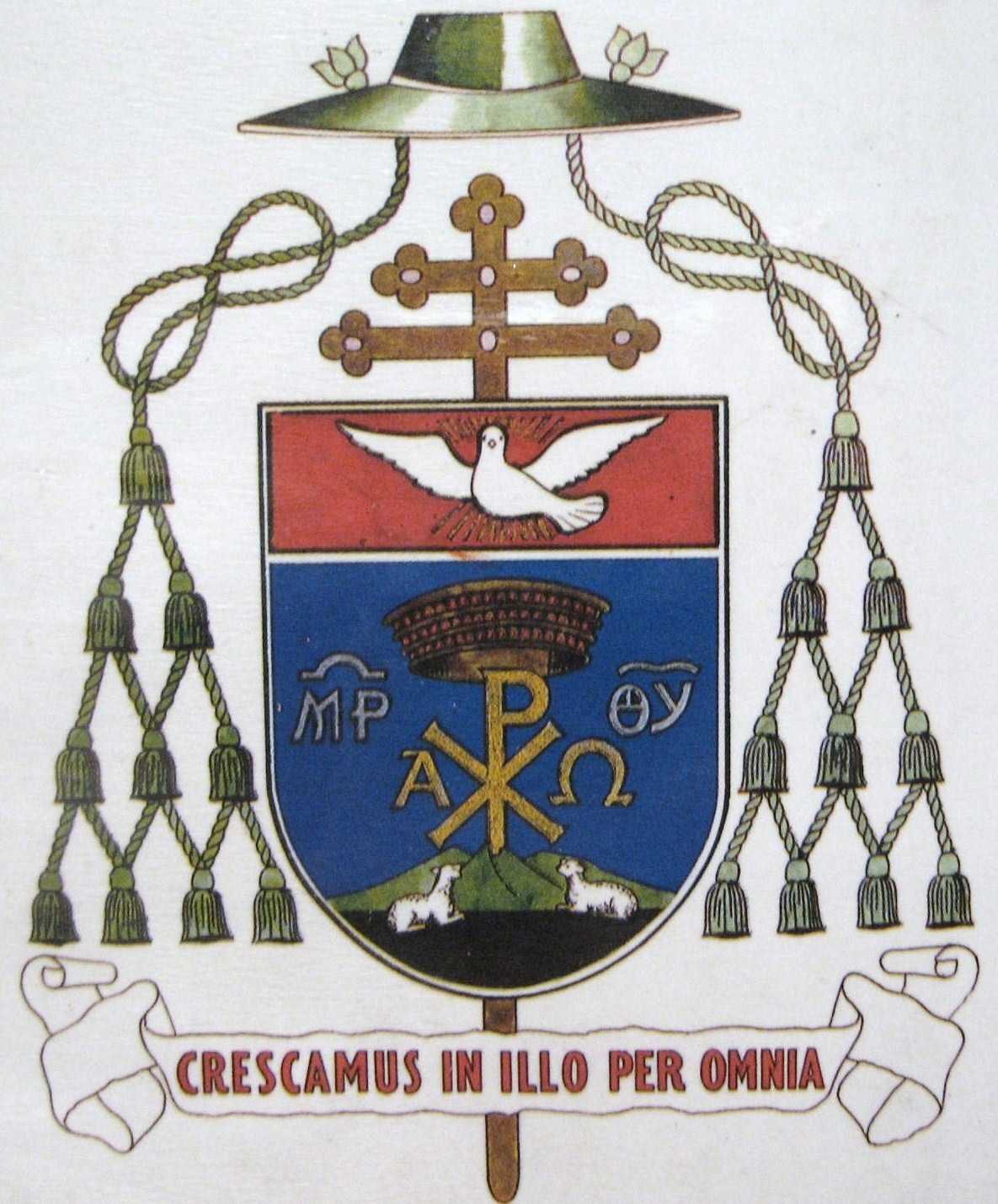 Escudo del séptimo Arzobispo de Monterrey Don Guillermo Tritschler y Córdova.